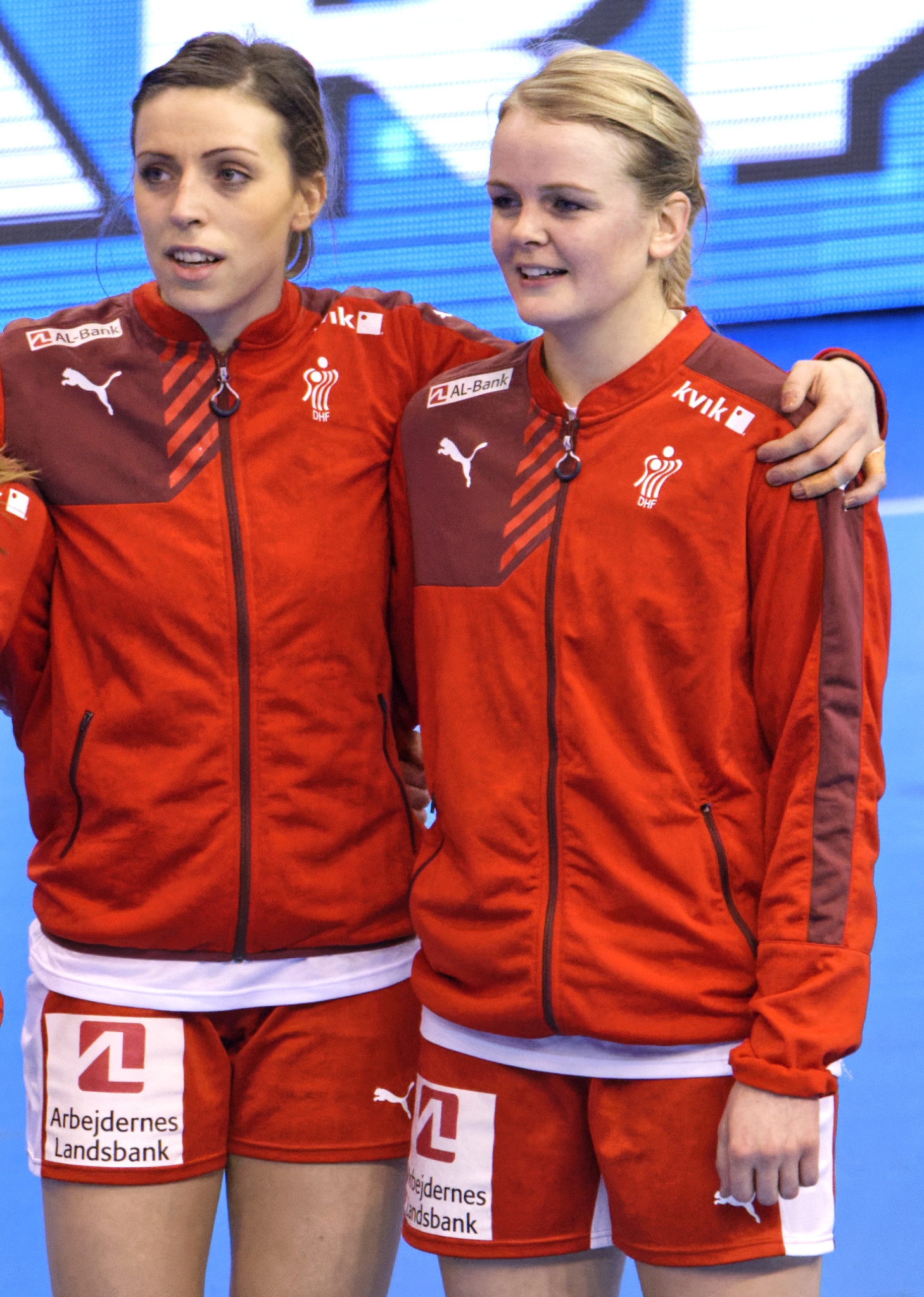 Rencontre France - Danemark lors de la Golden League. A Dijon, le 19 mars 2015.